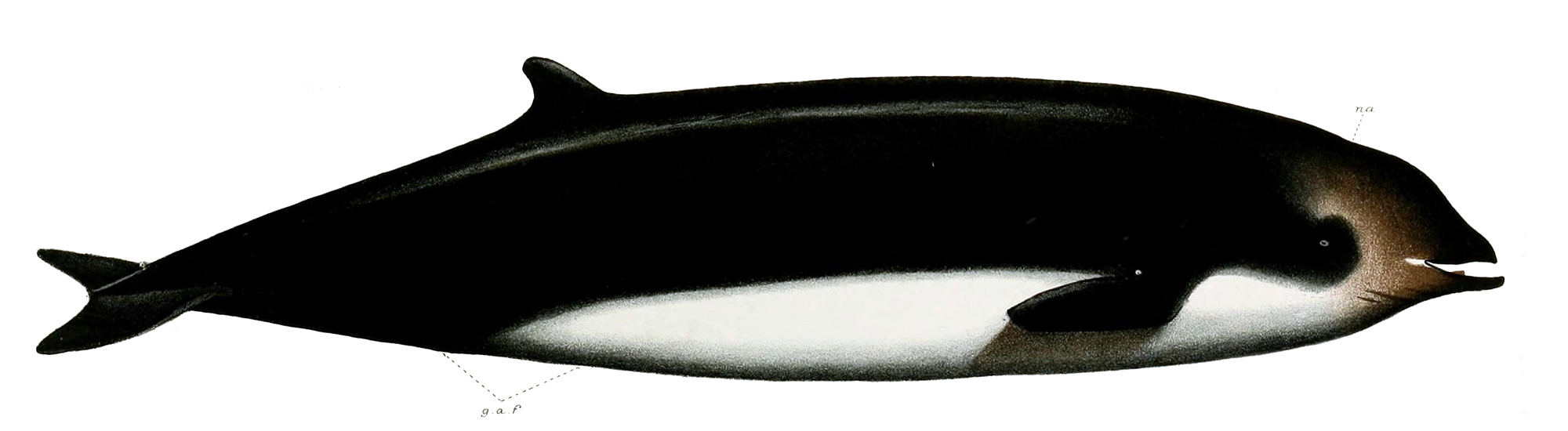 Ziphius cavirostris